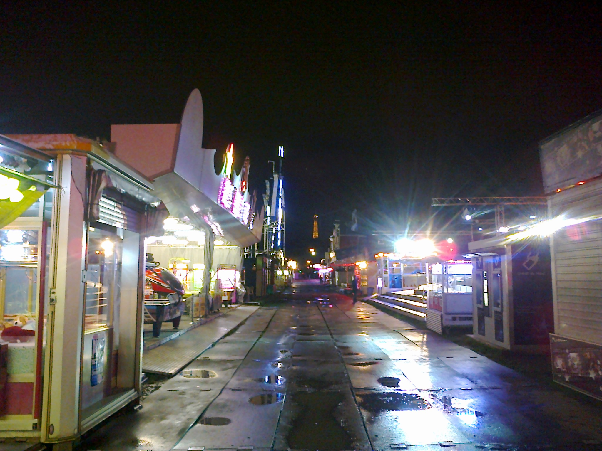 Fête à Neuneu de nuit. On peut apercevoir la Tour Eiffel en arrière-plan.